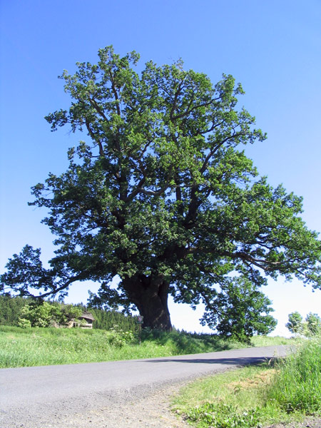 Horní z dubů nad Pozorkou.